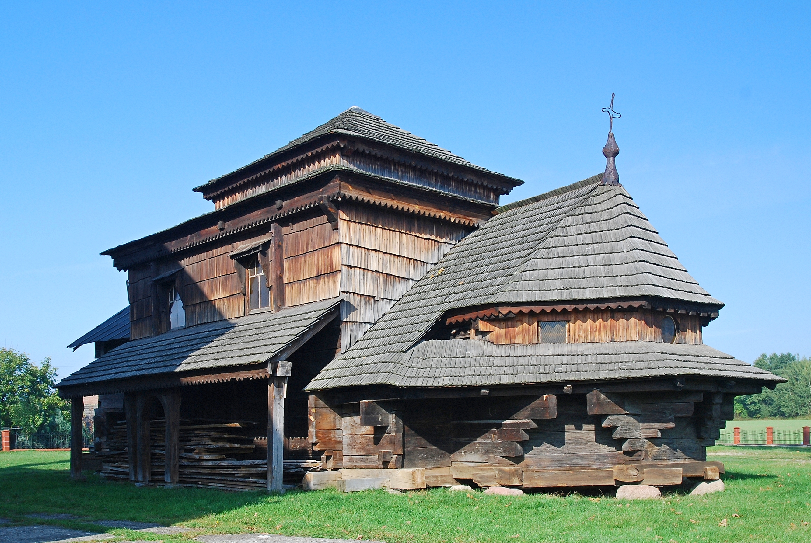 Rudka (województwo podkarpackie)